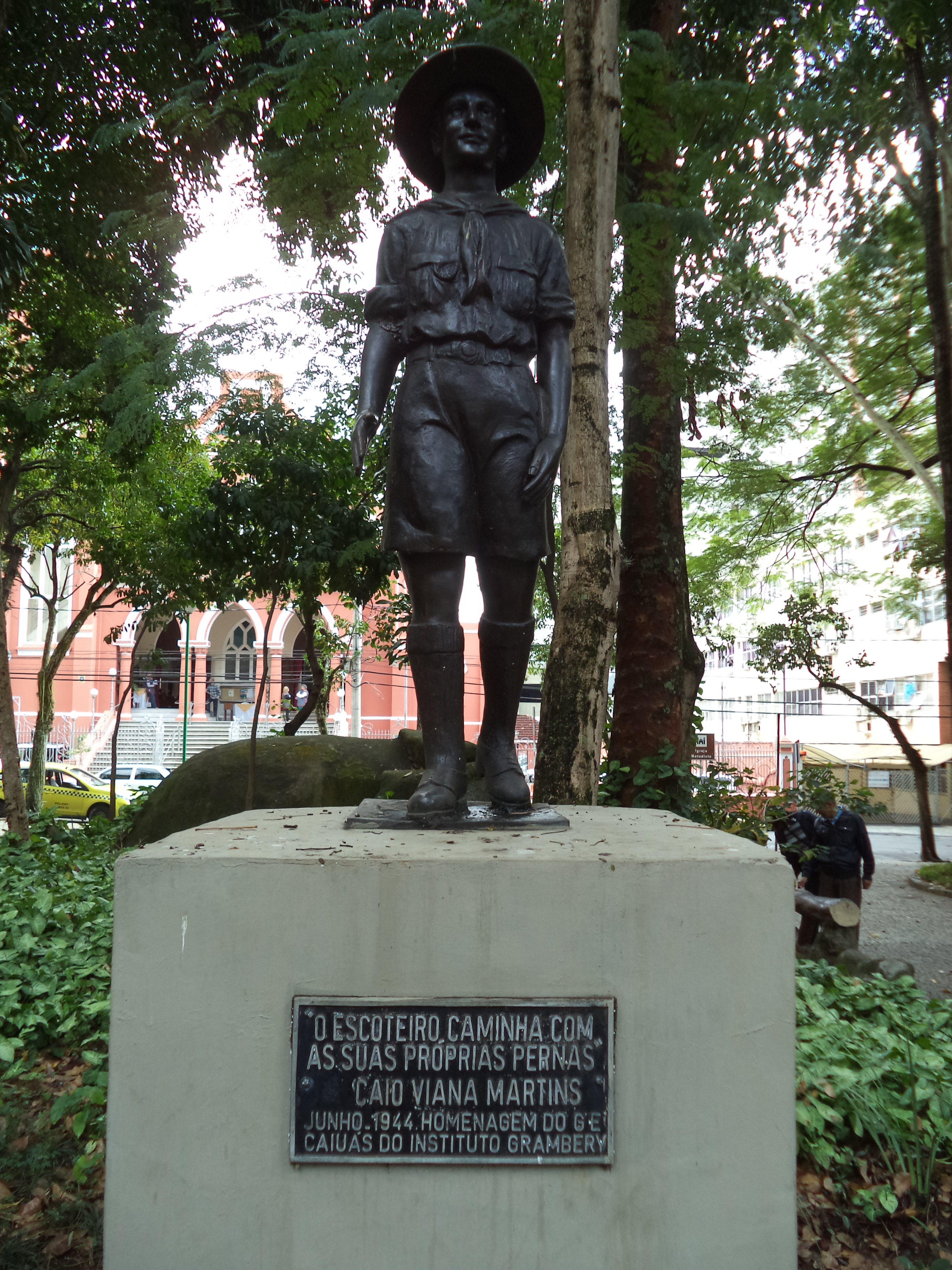 Estátua de Caio Viana Martins em Juiz de Fora, Minas Gerais.